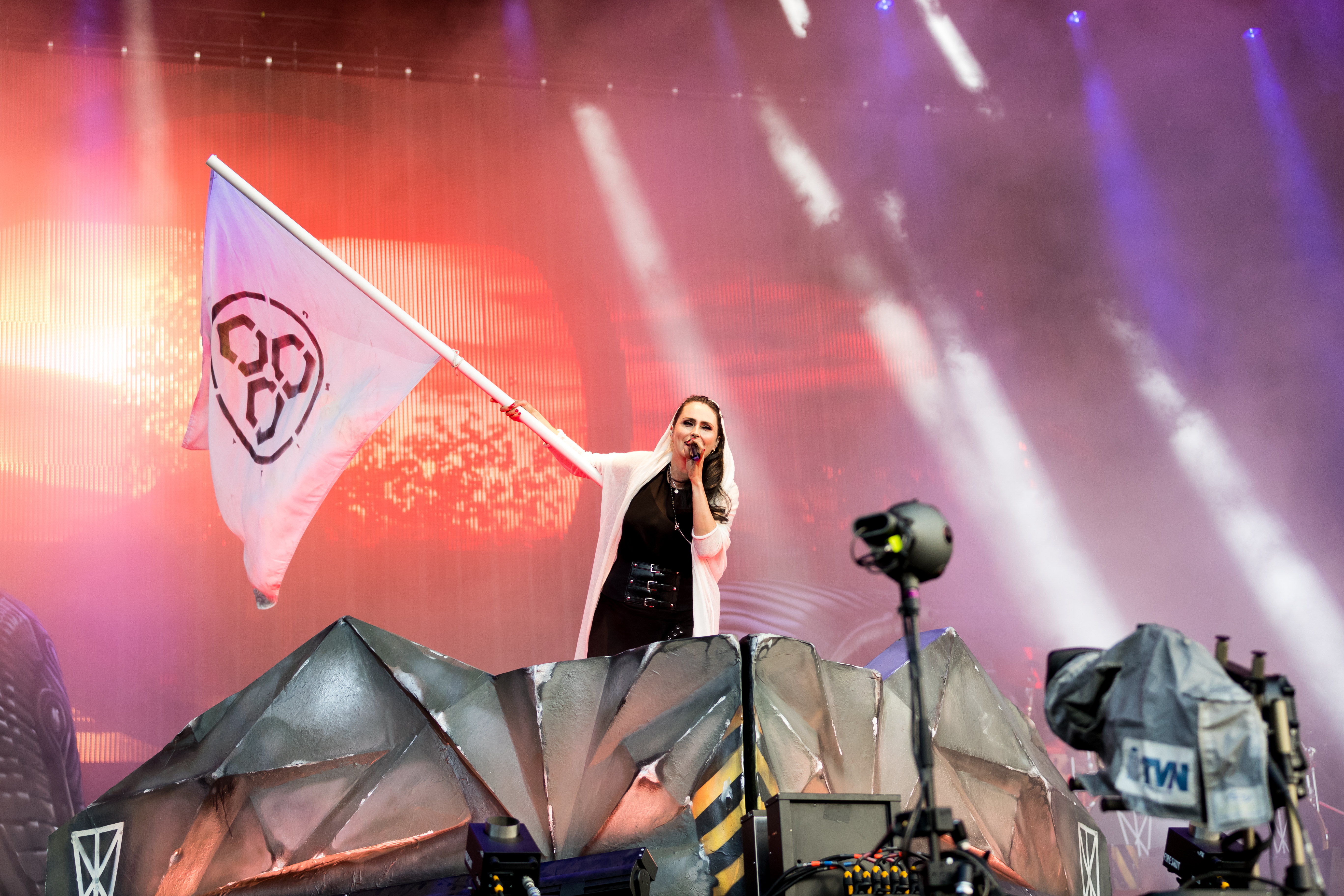 Within Temptation during Wacken Open Air at The Holy Wacken Land, Wacken, Schleswig-Holstein, Germany on 2019-08-02, Photo: Sven Mandel